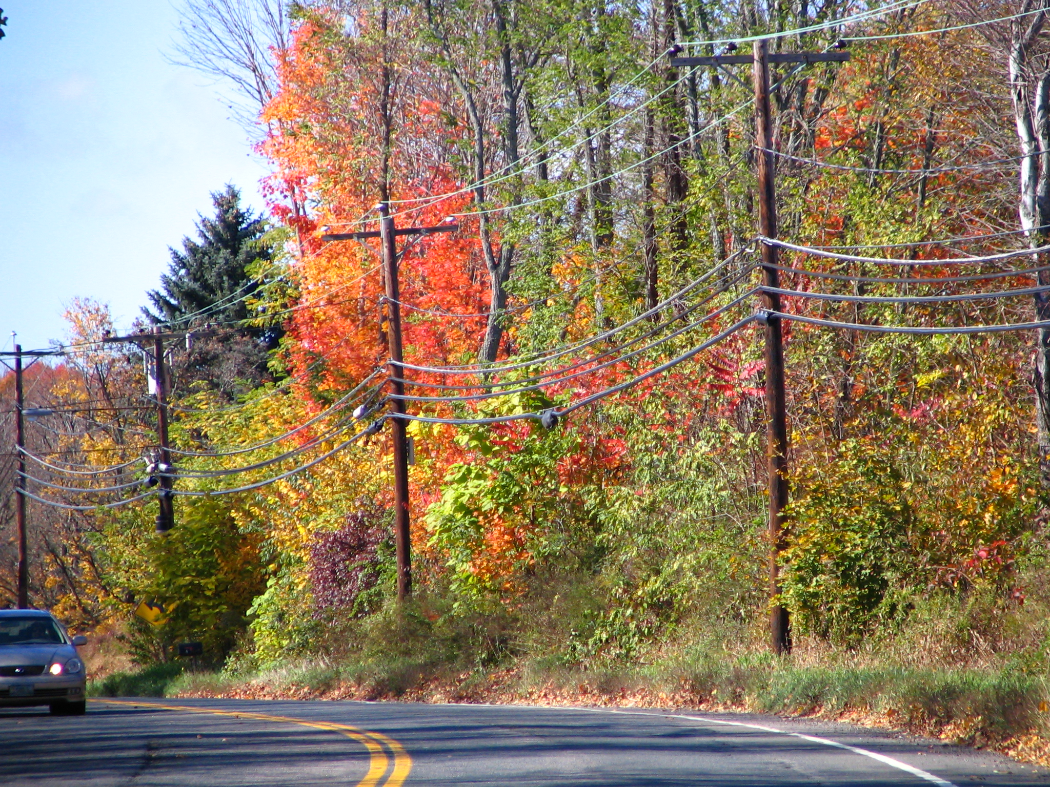 Podzim v Connecticutu